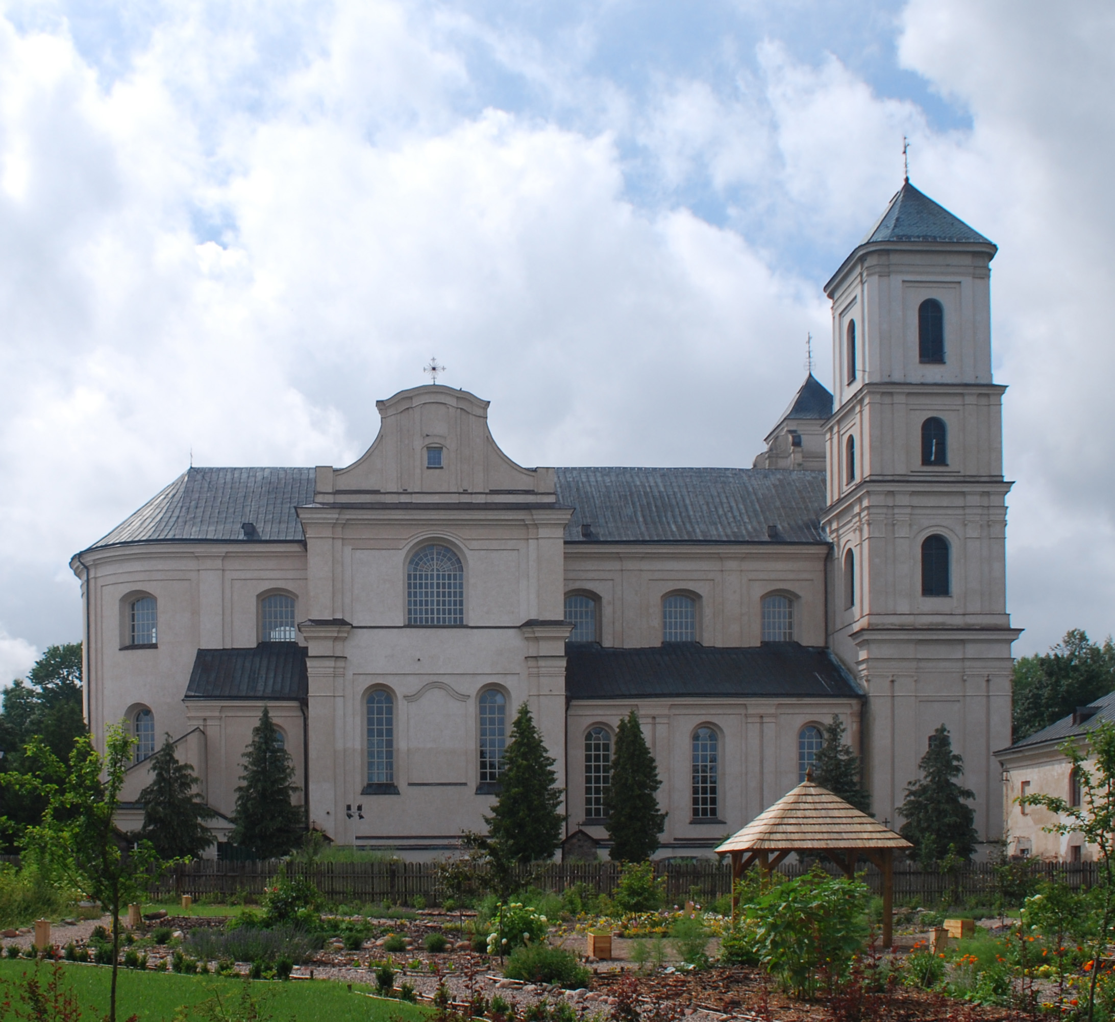 Sanktuarium Maryjne w Różanymstoku - bryła od strony ogrodu.